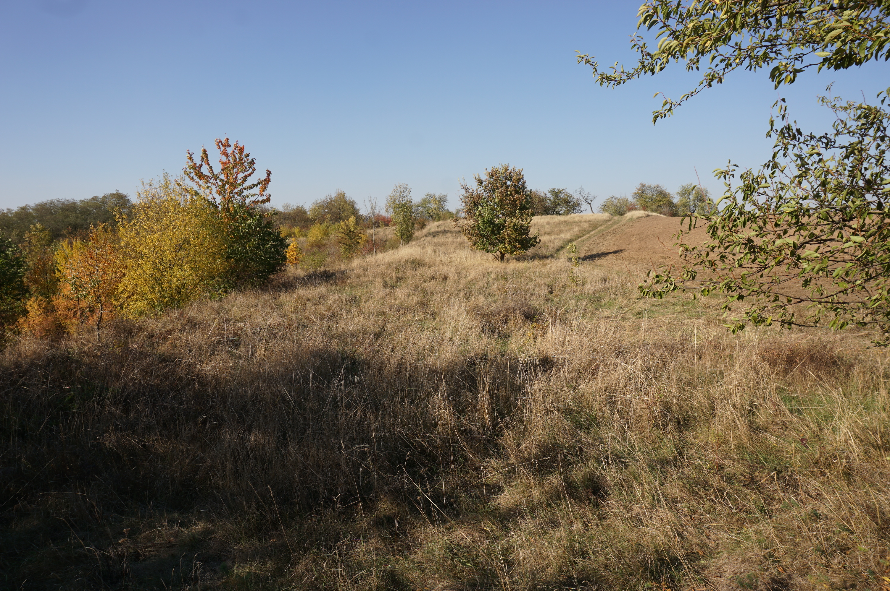 Hradiště Klučov – Na Ptáčku, k. ú. Klučov u Českého Brodu, Poříčany, Klučov (okres Kolín).